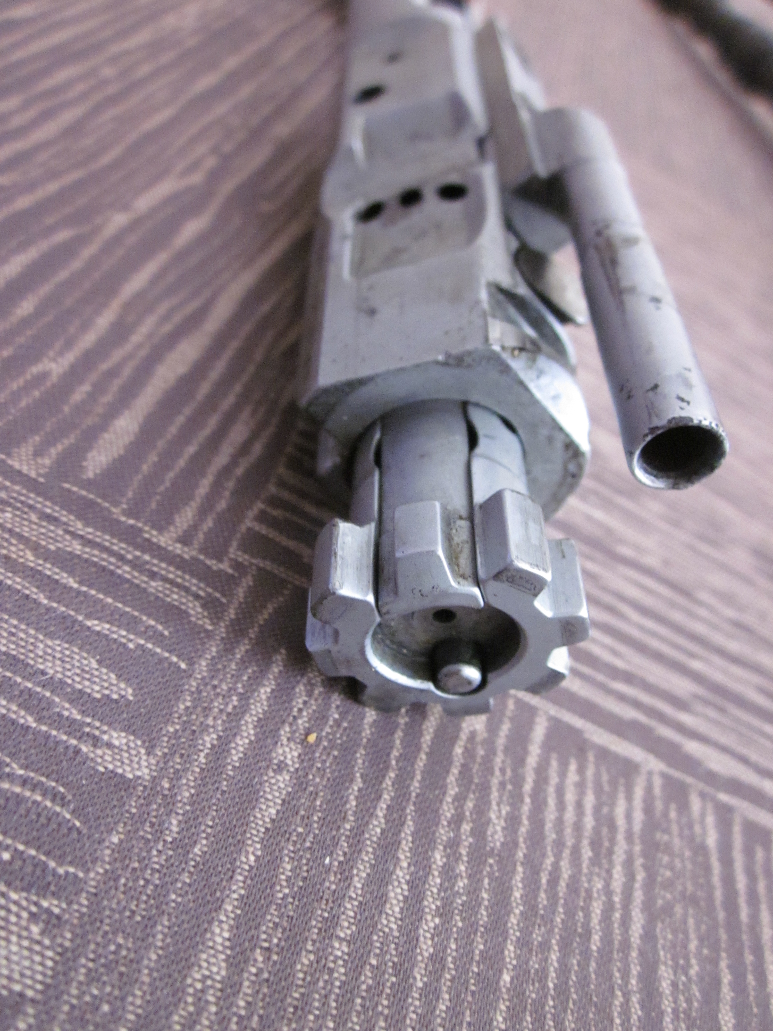 photo AR10